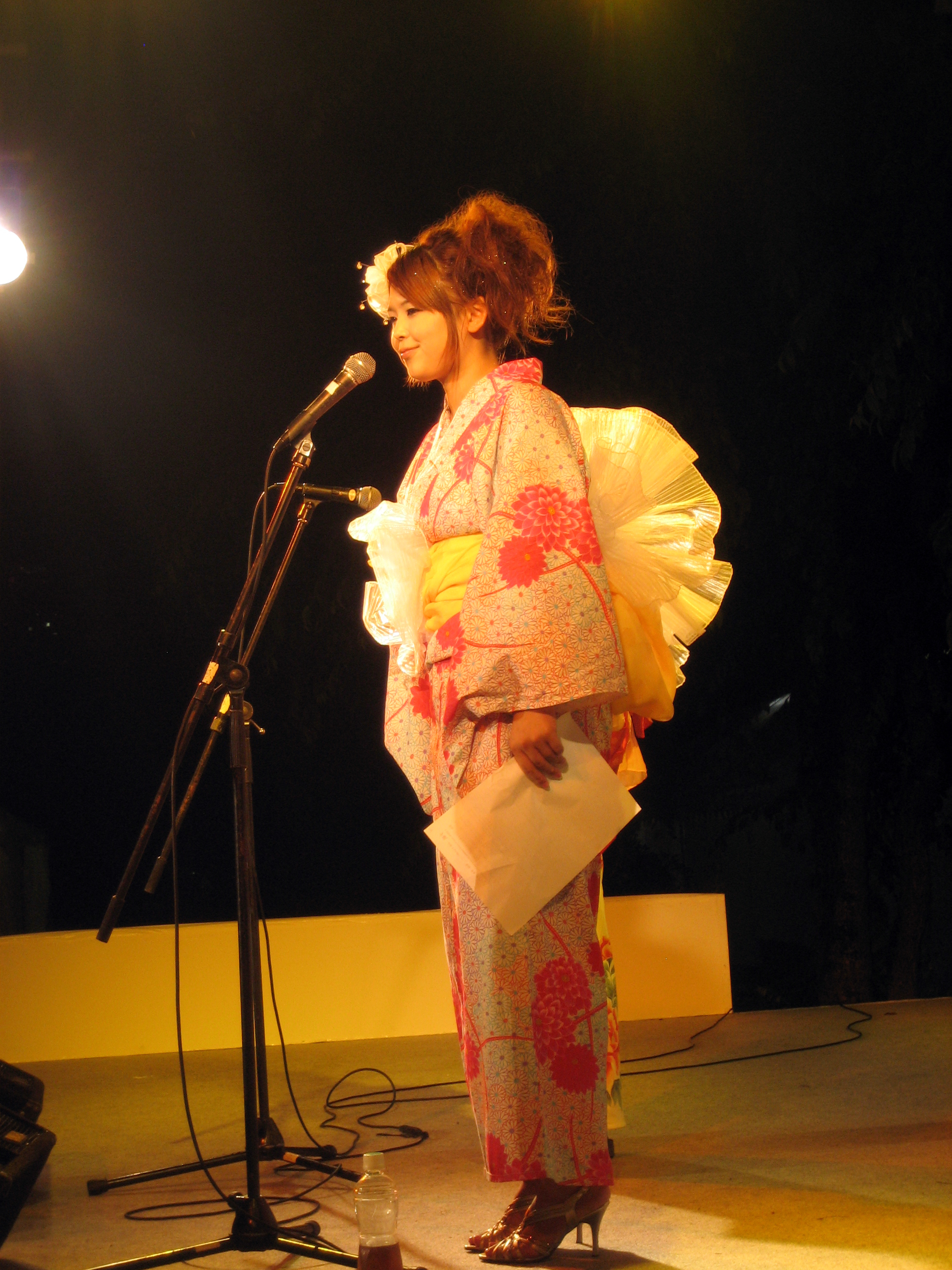 2009年6月22日から23日にかけて、姫路市大手前通りにて開催された「姫路ゆかた祭」。2つ日間にかけて行なわれた祭の風景。注意:ファイル番号及び日時は撮影時系列純にはなっておりません。また、性別、年齢、国籍などによる分類は推定で行なっております。